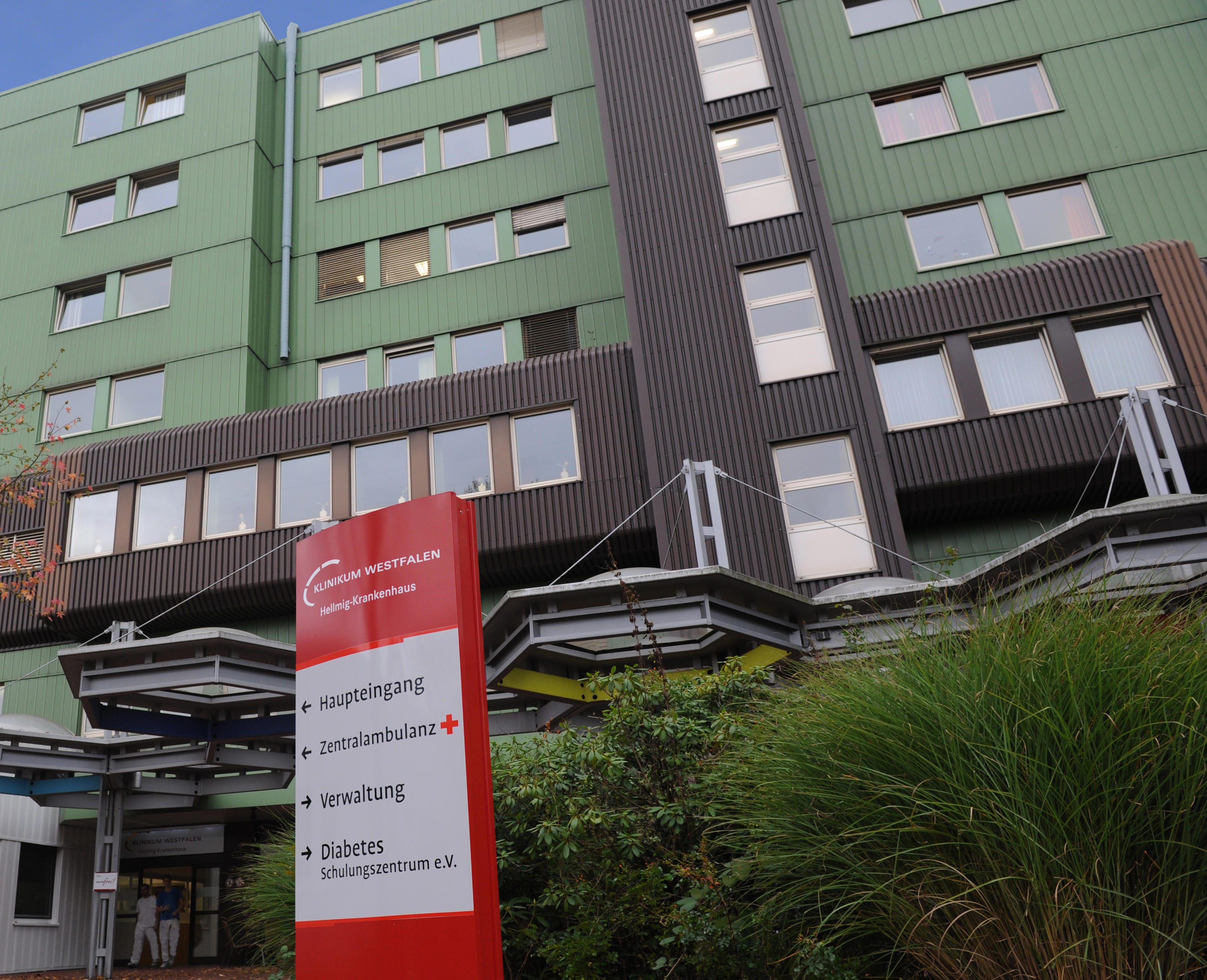 Der heutige Eingangsbereich des Hellmig-Krankenhauses.